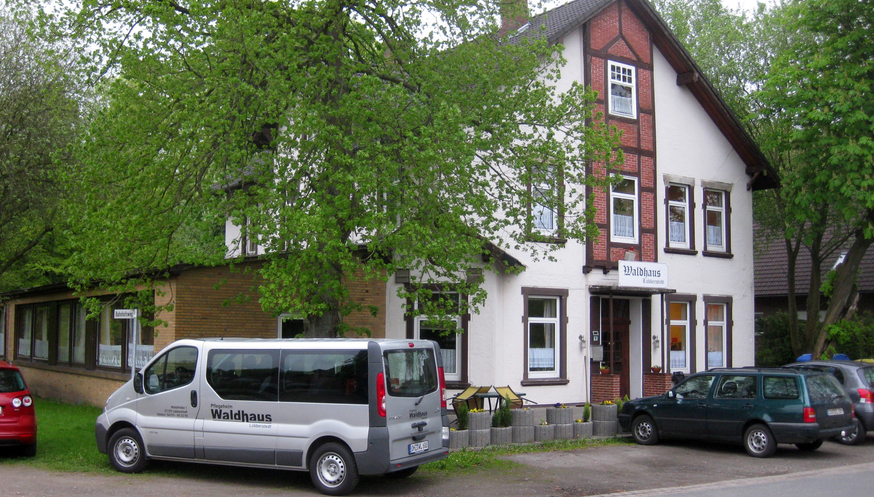 Ausflugslokal "Waldhaus" in der Nähe des Lübberstedter Bahnhofs, das gern von Wochenendtouristen aus Bremen und Bremerhaven besucht wurde - heute ist es ein Pflegeheim.